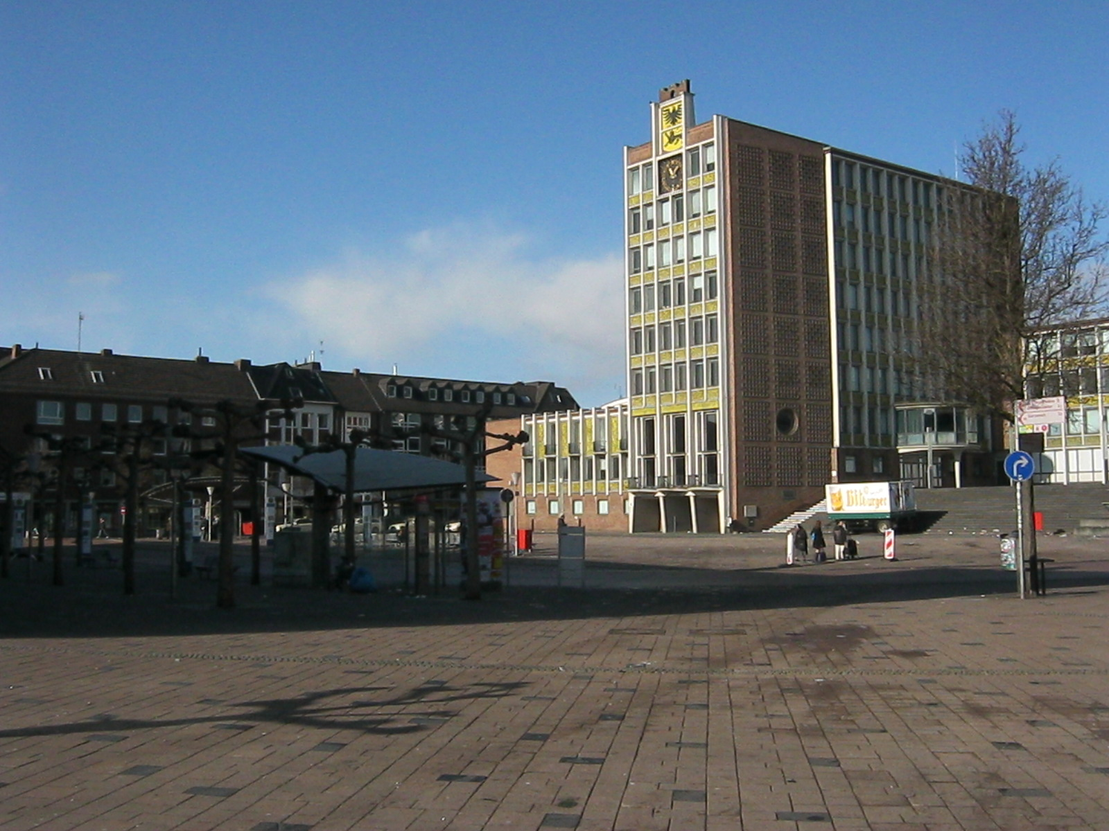 Der Kaiserplatz in Düren vom Markt aus gesehen